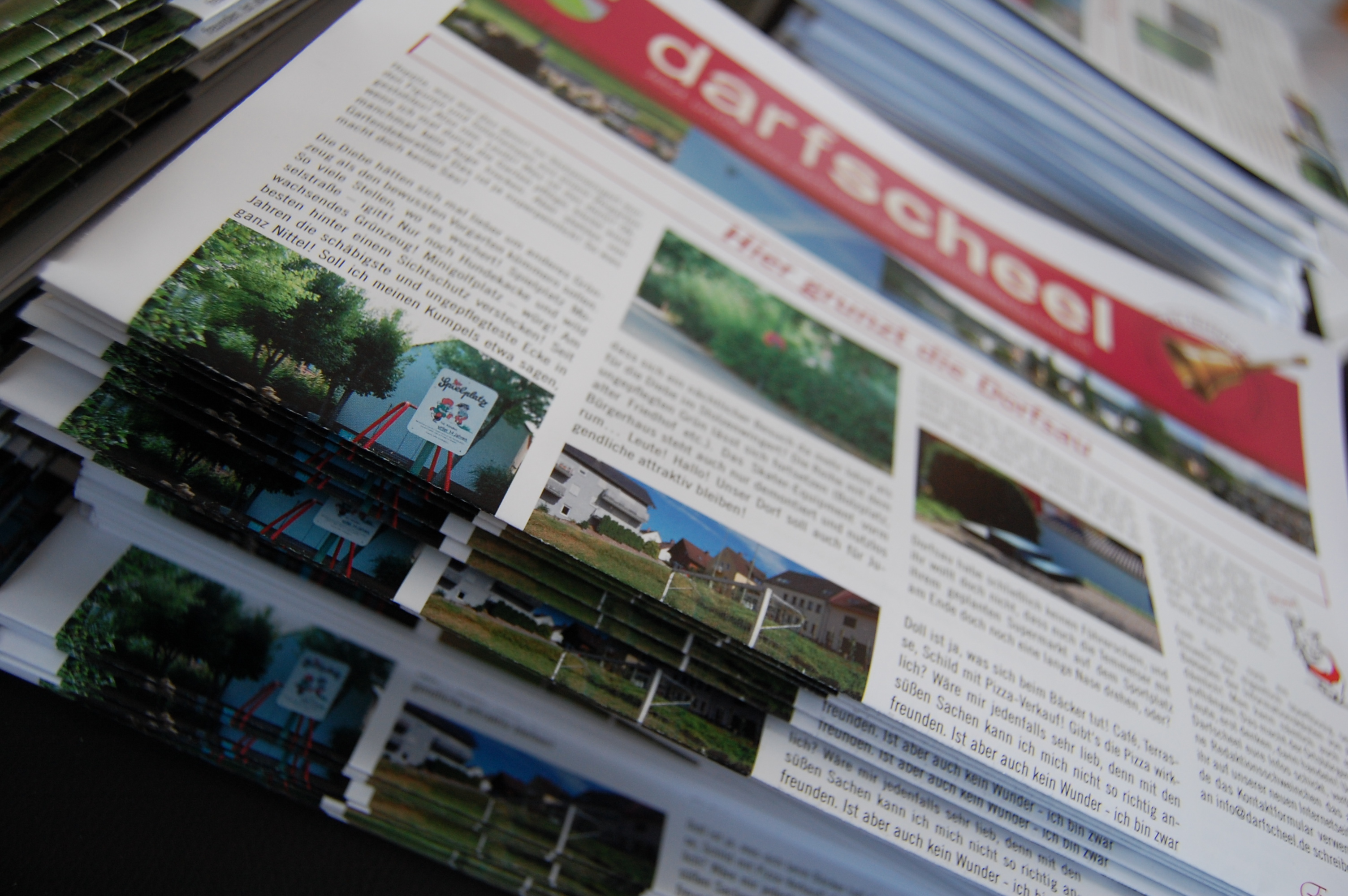 Darfscheel Dorfzeitung Nittel e.V., Ausgabe August 2012, Stapel